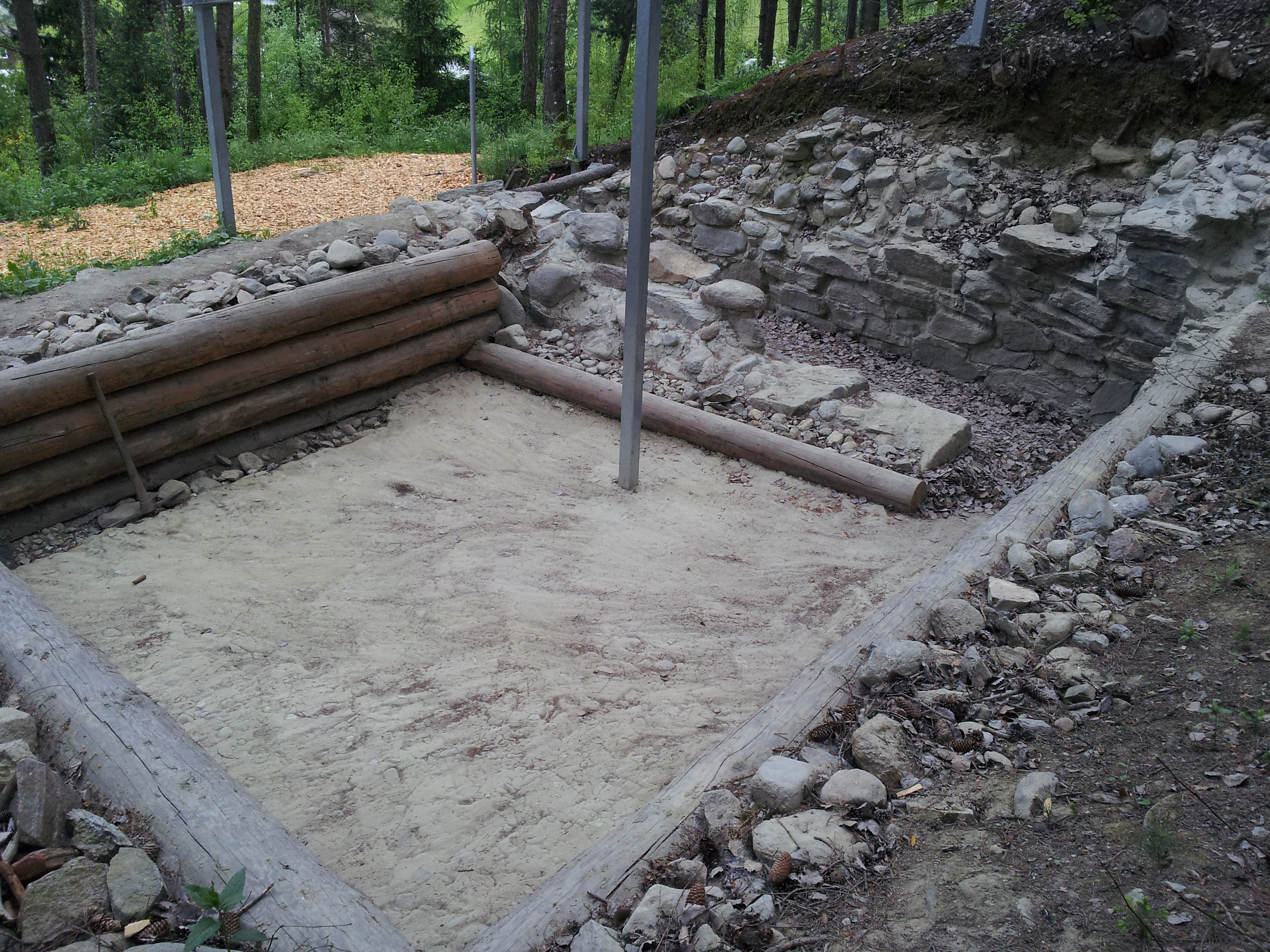 Hohe Birga Haus X